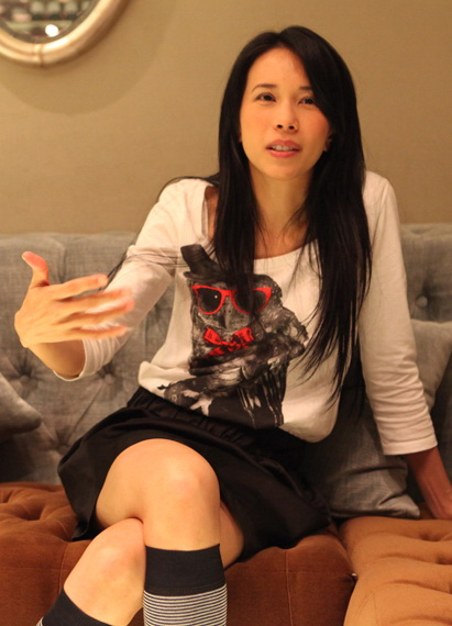 Карен Мок